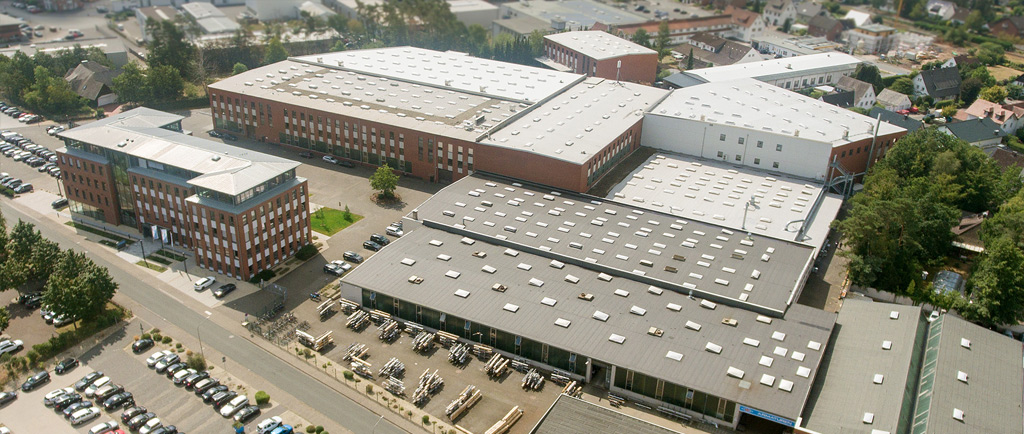 Шлосс-Хольте-Штукенброк (нем. Schloß Holte-Stukenbrock), где расположены штаб-квартира компании и производство оборудования типоразмерами от 15 до 200 мм